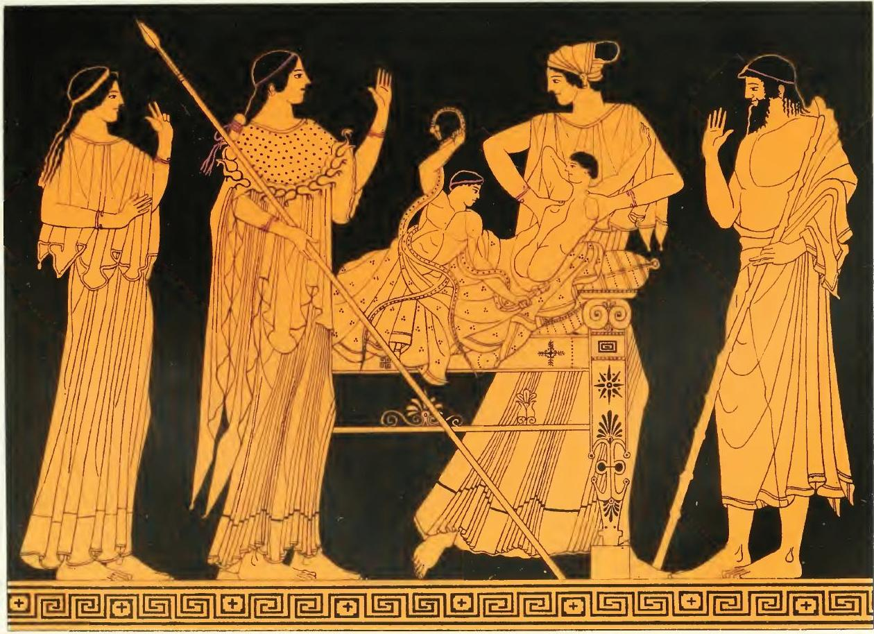 Héraclès enfant étouffant les serpents, Louvre G 192